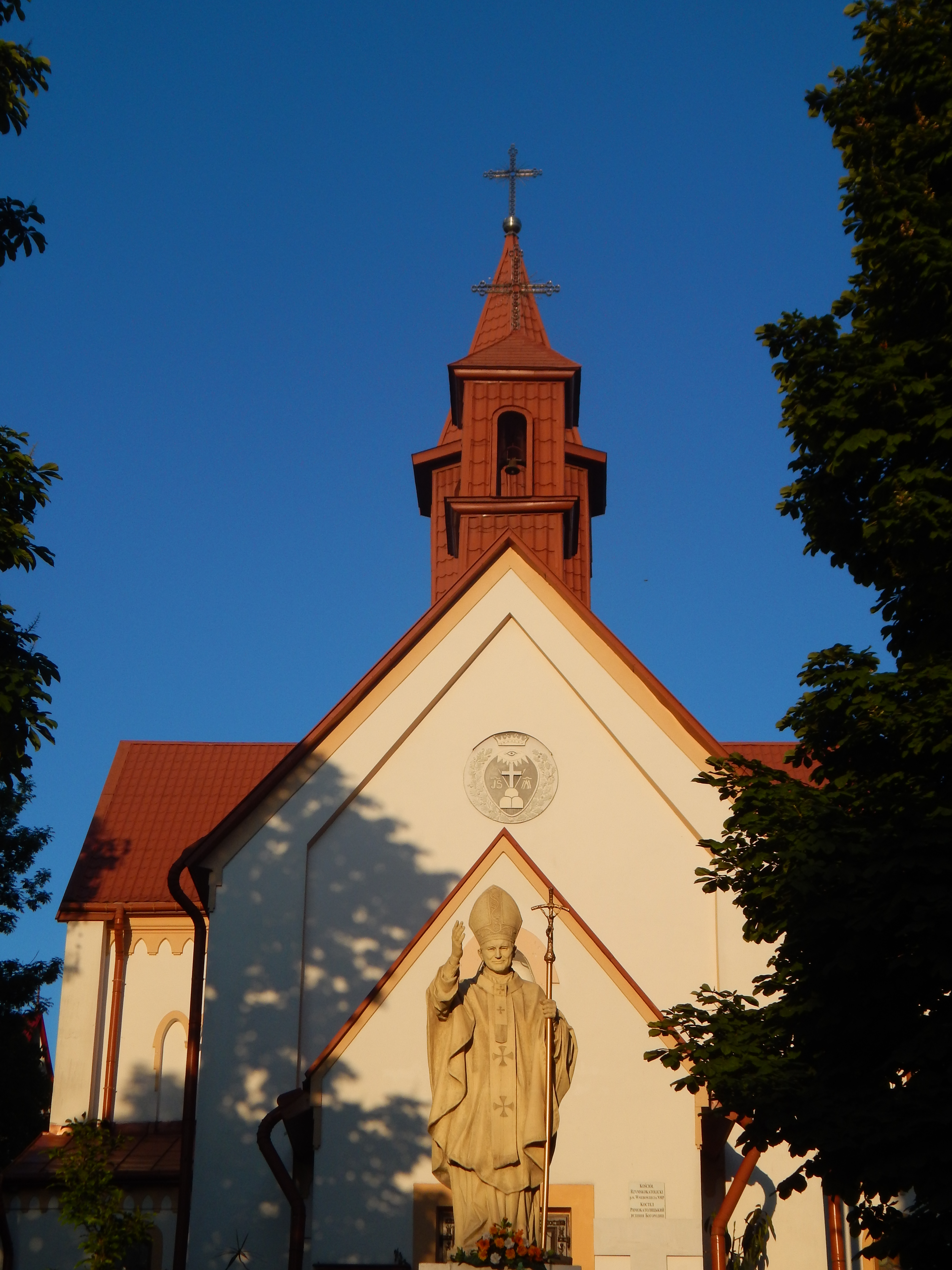 Курортний парк, Дрогобицький р-н, м. Трускавець